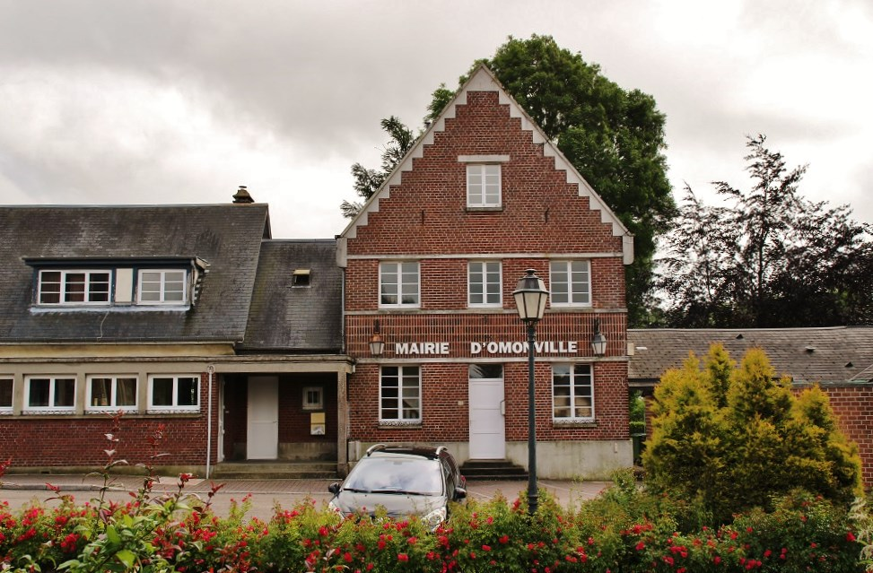 La Mairie